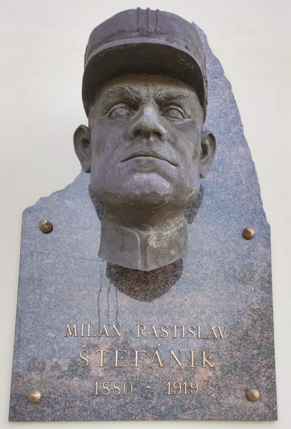 Milan Rastislav Štefánik - busta na rodném domě